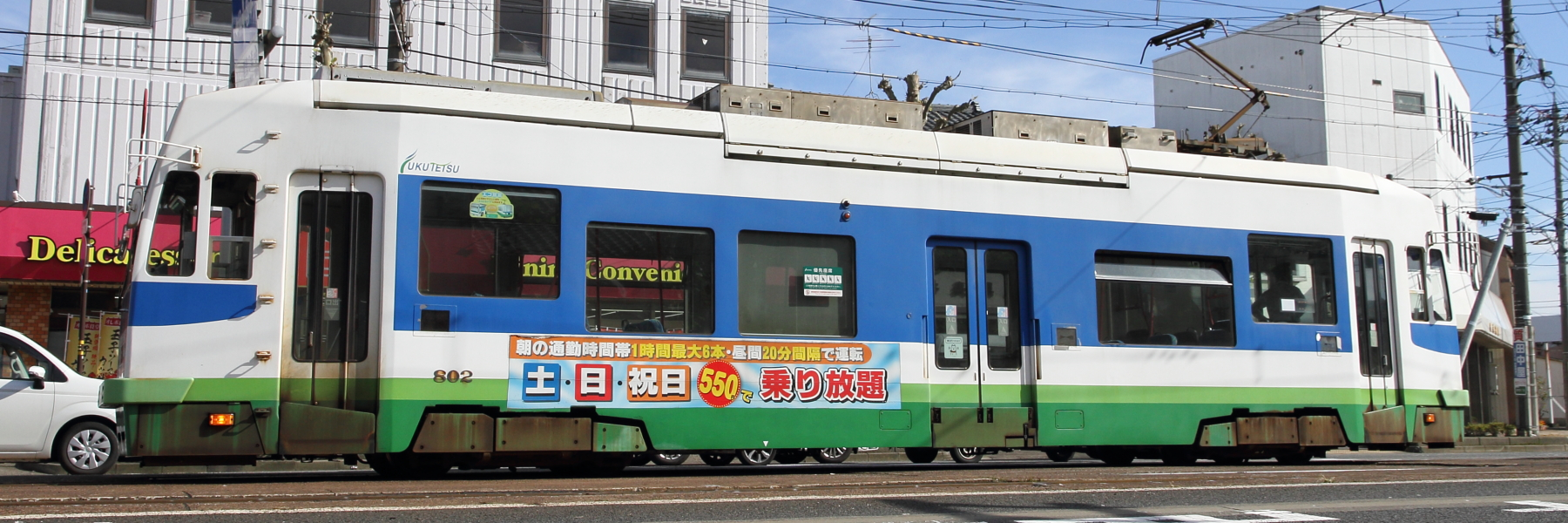 福井鉄道モ800形802号の側面。